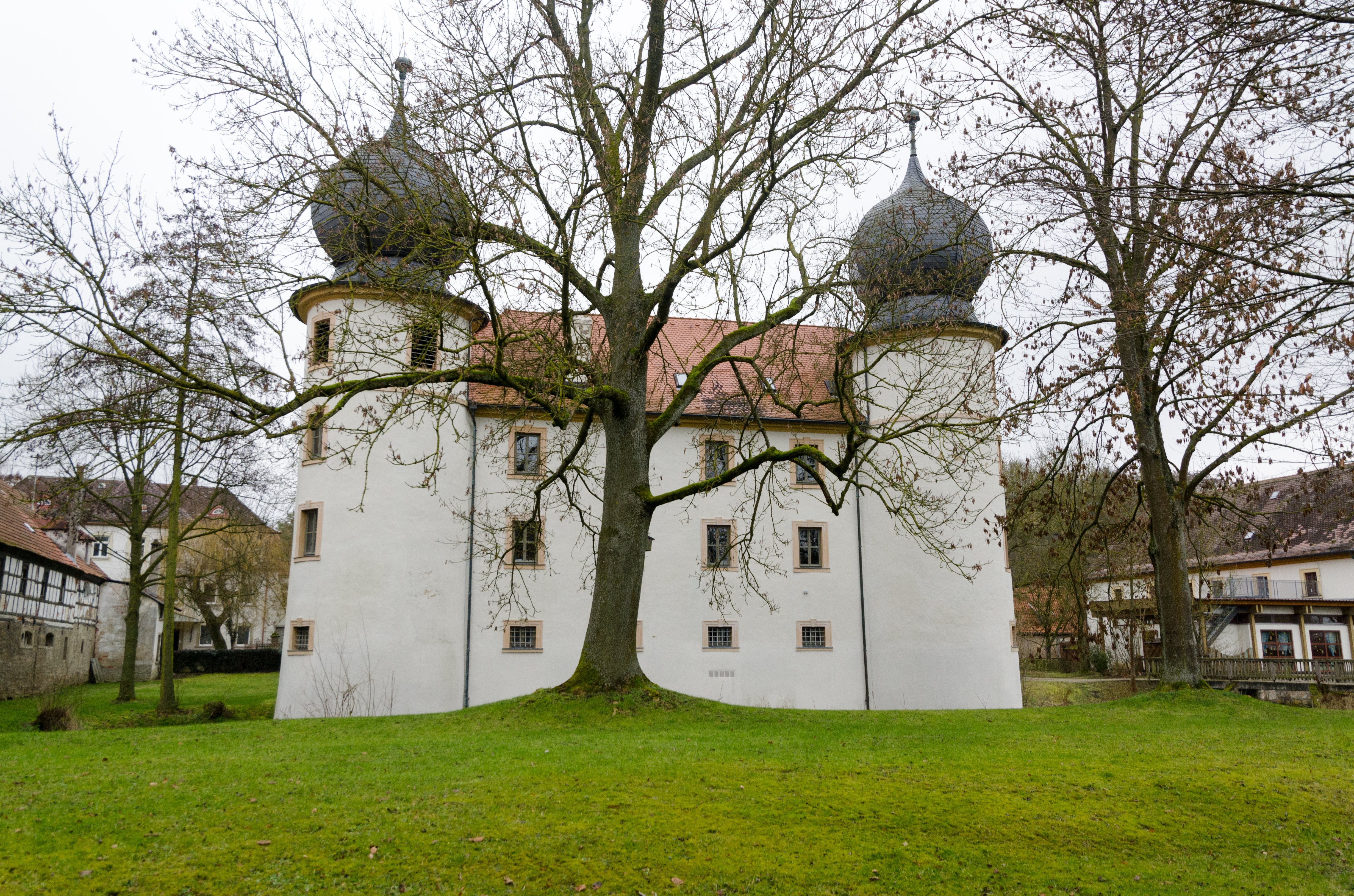 Wasserschloss in Thundorf in Unterfranken